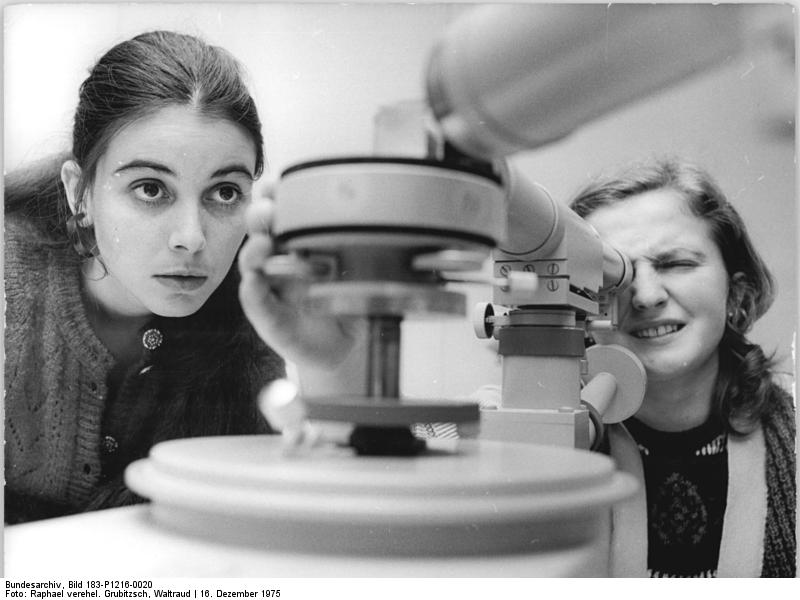 Leipzig, Universität, Physik-Praktikum ADN-ZB Raphael 16-12-75 Leipzig: Studienarbeit an der Karl-Marx-Universität-Einmal wöchentlich steht auch für die kubanische Studentin Marta Alvarez (l.) und Ingrid Lehmann aus der DDR ein Physik-Praktikum im Uni-Hochhaus auf dem Stundenplan. Am Präzisionsgoniometer-Spektrometer bestimmen sie hier den Berechnungsindex. Jeder zehnte Student an der KMU kommt zur Zeit aus dem Ausland. Gegenwärtig erhalten an dieser Lehr- und Bildungsstätte mehr als 1100 (1100) junge Menschen eine wissenschaftliche Ausbildung. Bitte auch Motiv P1216-21N beachten!